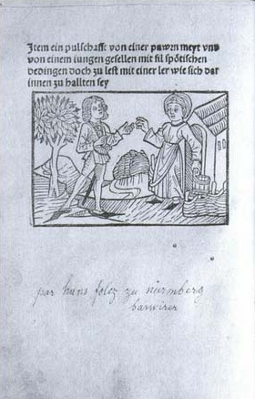 Hans Folz: Werbung im Stall (Eine Buhlschaft von einer Bauernmaid und einem jungen Gesellen), Titelseite, 1479-1483.